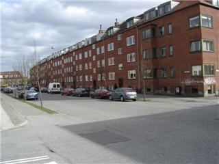 Chritiansbjerg Århus N. Brendstrupvej.